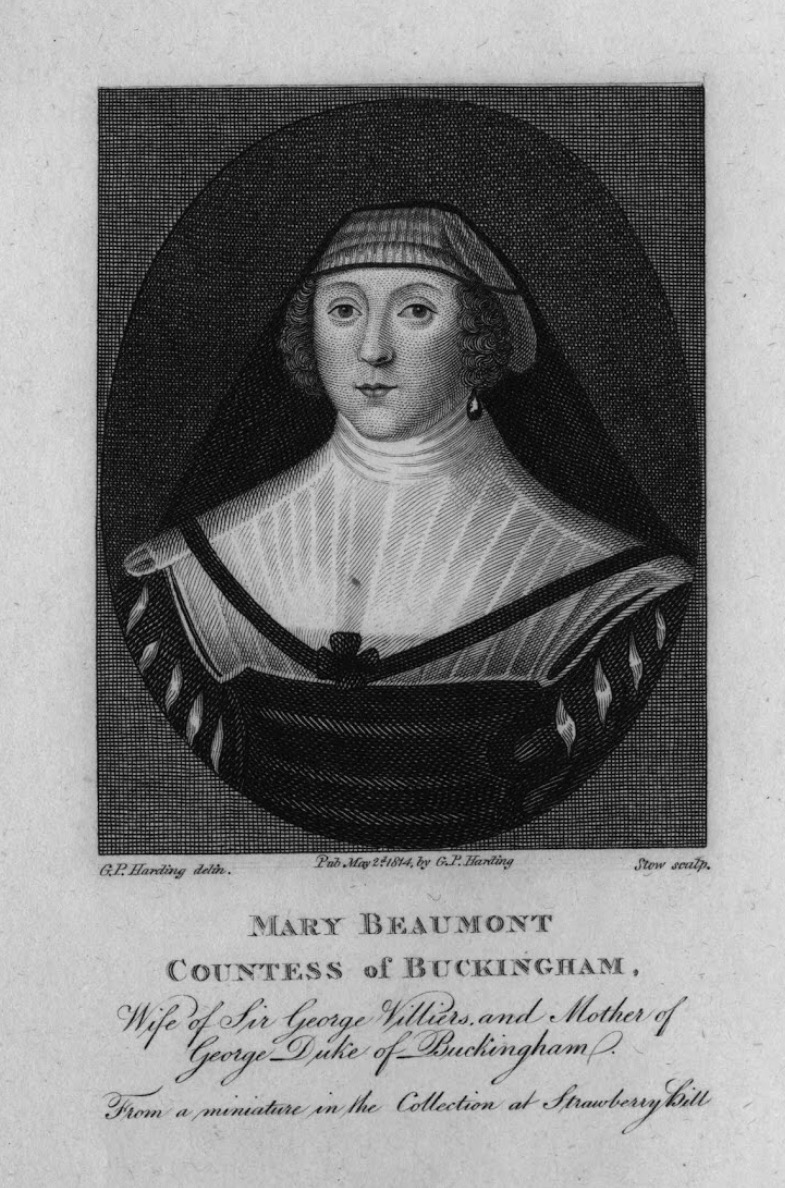 Portrait copper engraving